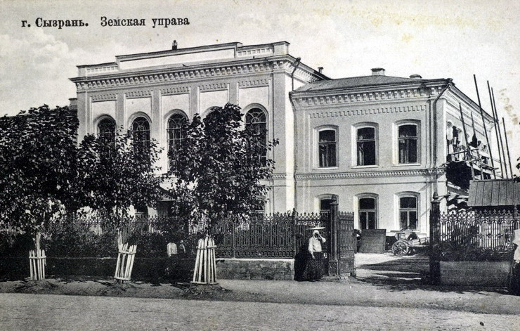 Здание Сызранского уездного земского собрания (школа искусств на Советской). 1880-е годы. (ул. Советская, 83)